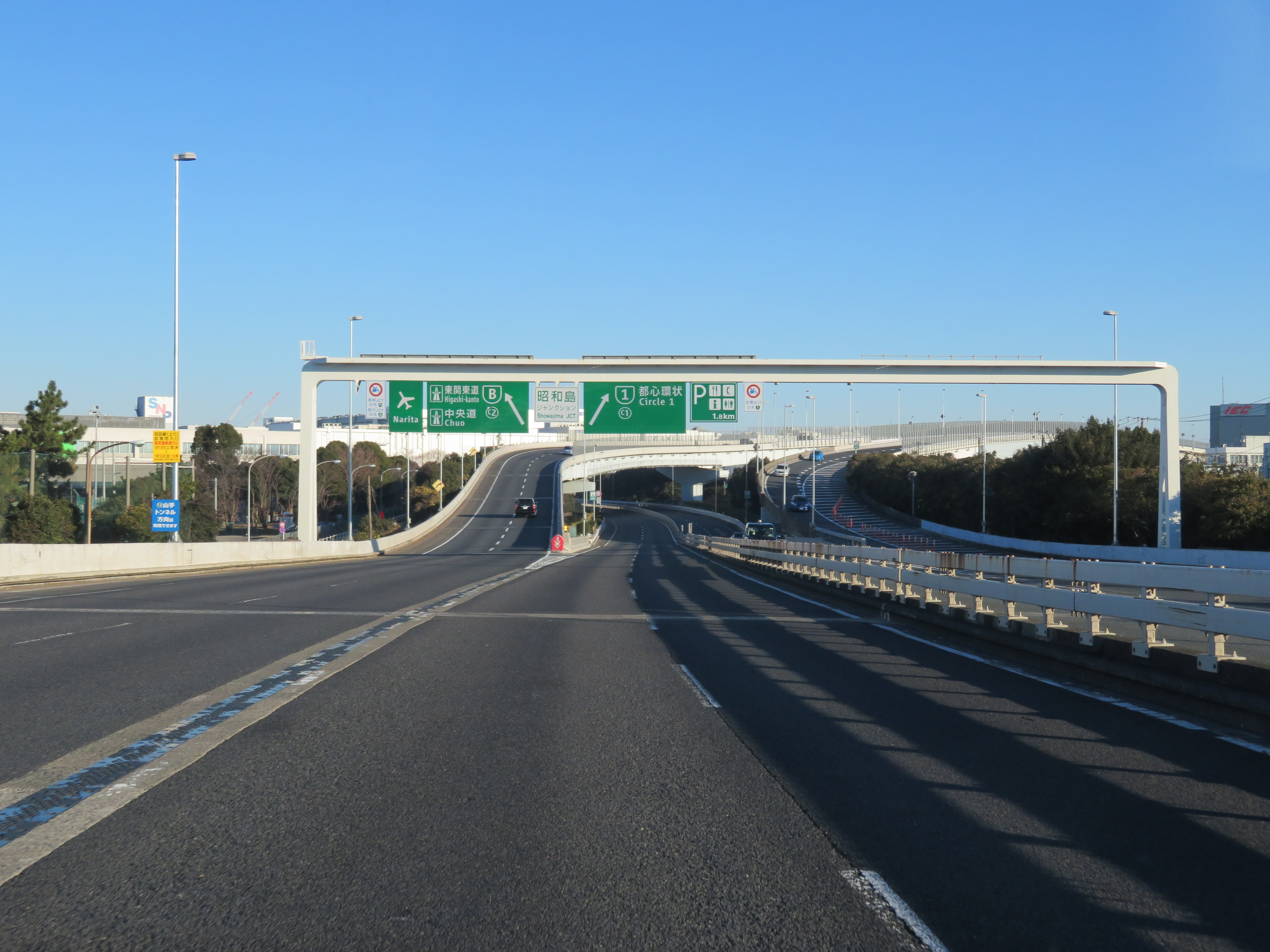 首都高速道路1号羽田線昭和島JCT（上り分岐付近）